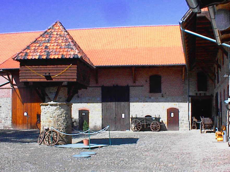 Museumshof Meisdorf/Harz